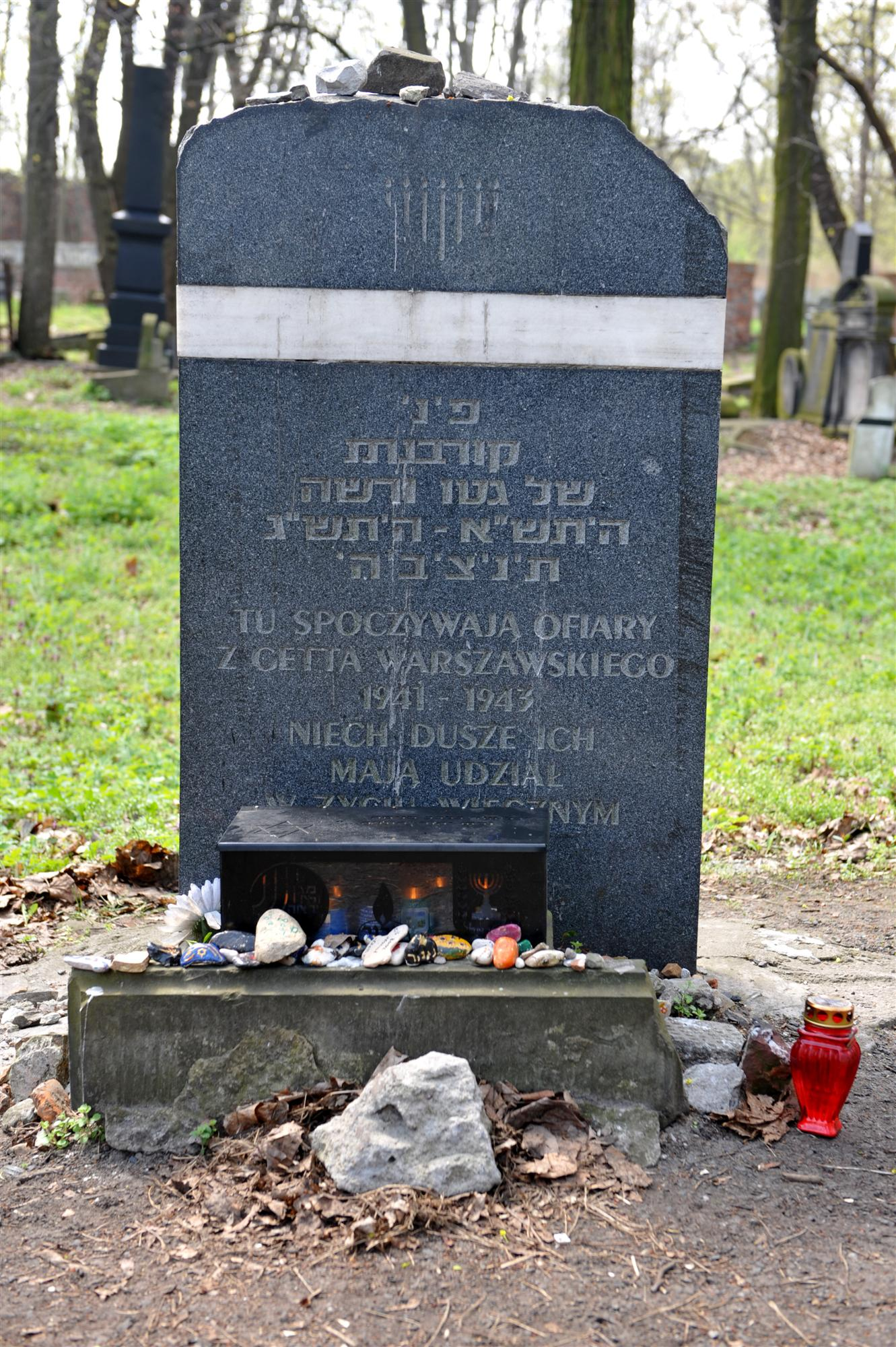 Nagrobek ofiar getta warszawskiego - Cmentarz Żydowski w Warszawie